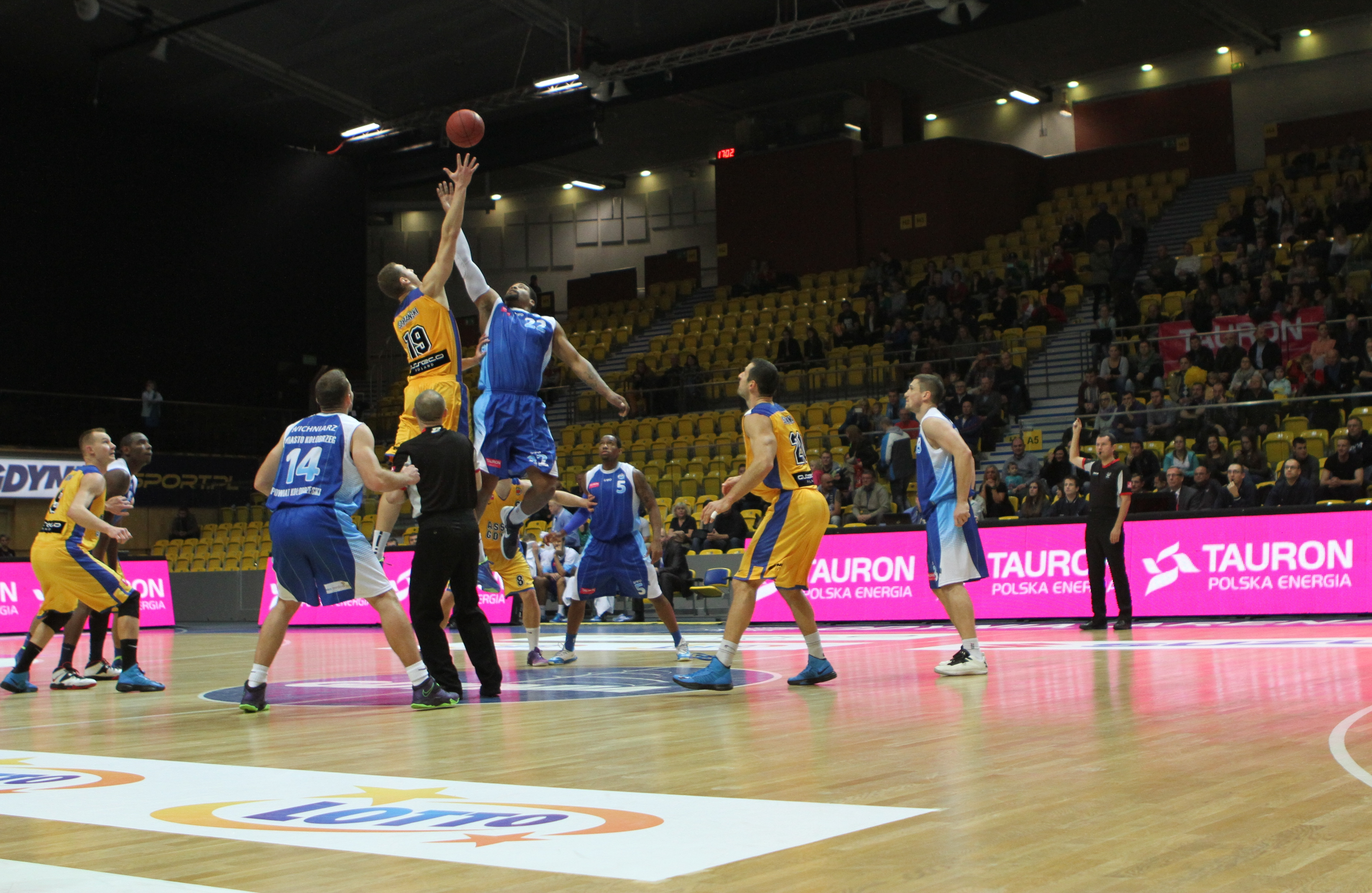 Asseco Gdynia, Kotwica Kołobrzeg, Tauron Basket Liga